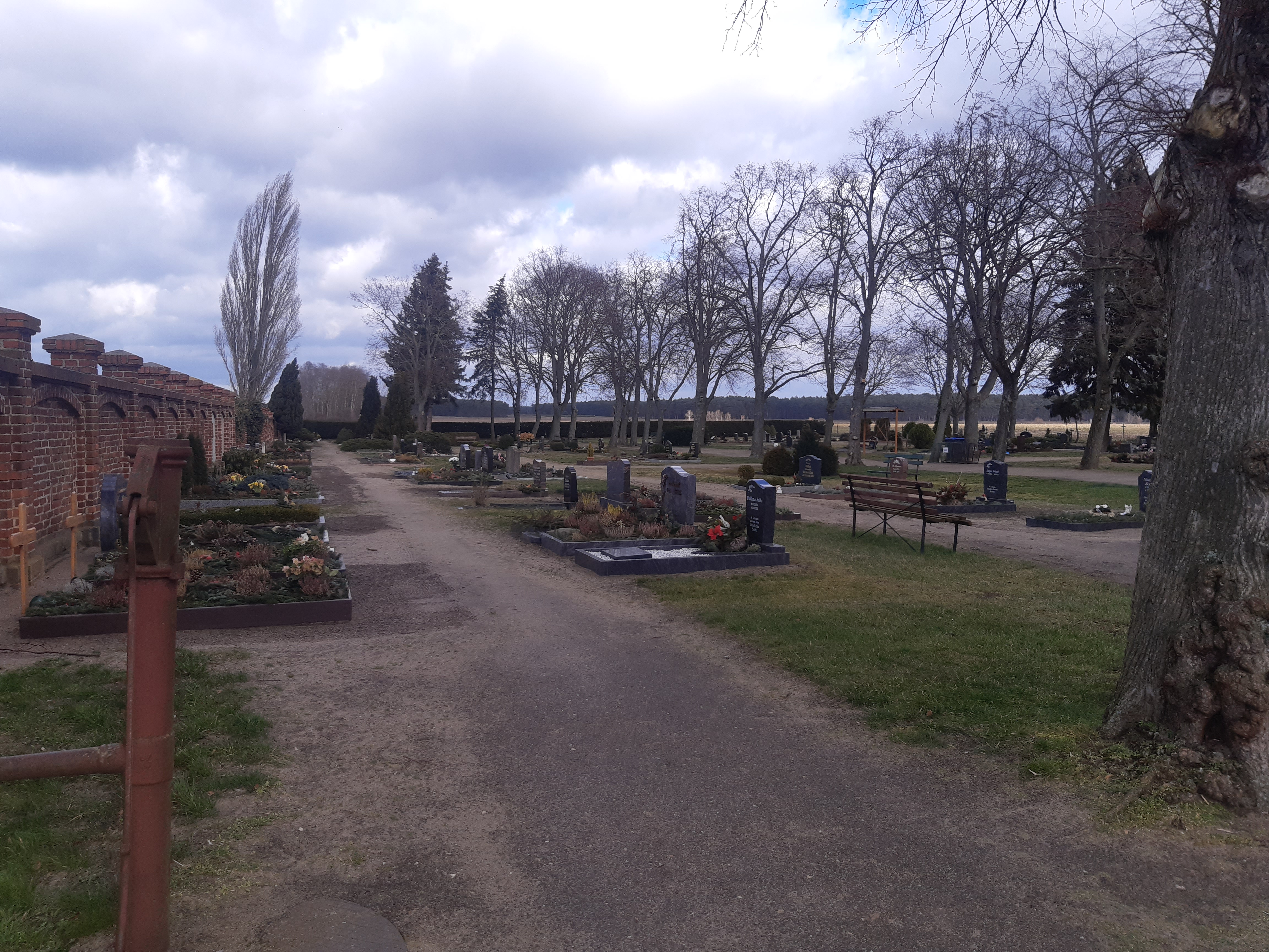 Friedhof